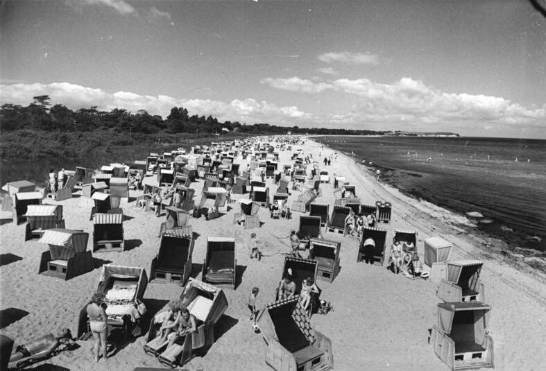 ADN-ZB Weisflog-16-7-82-schl-Bez. Rostock: Blick auf den Strand von Boltenhagen. In der Umgebung von Boltenhagen und Tarnewitz verbringen rund 380 000 Gäste ihre Ferien. 1961 entstand hier die erste Urlaubersiedlung des FDGB im Ostseebezirk.